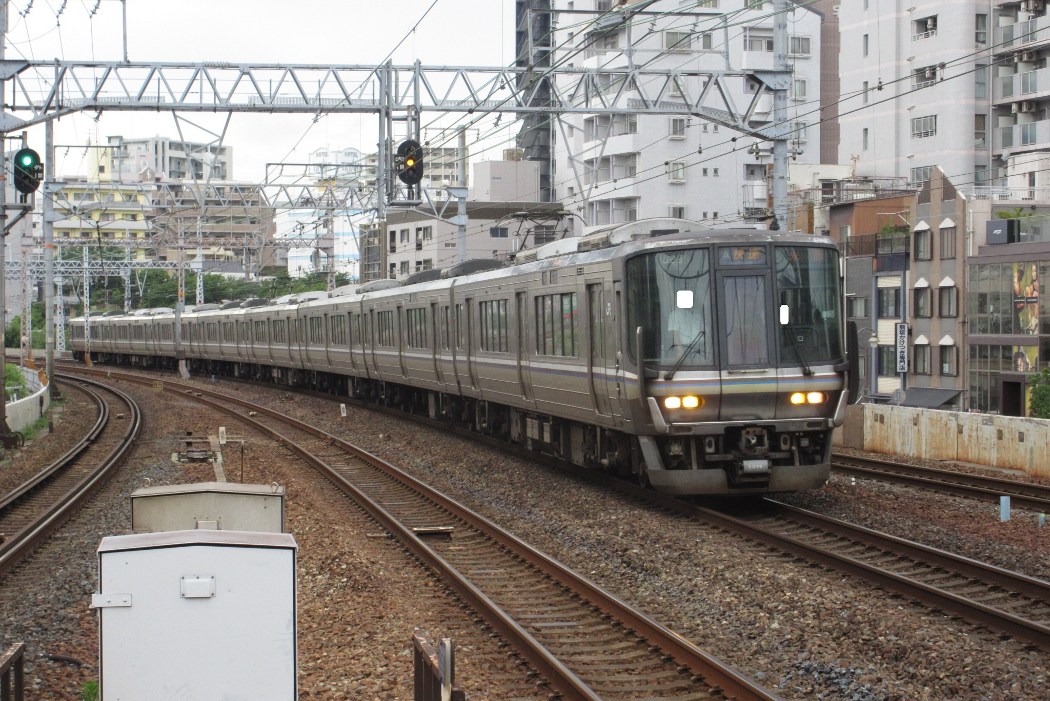 223系W6編成